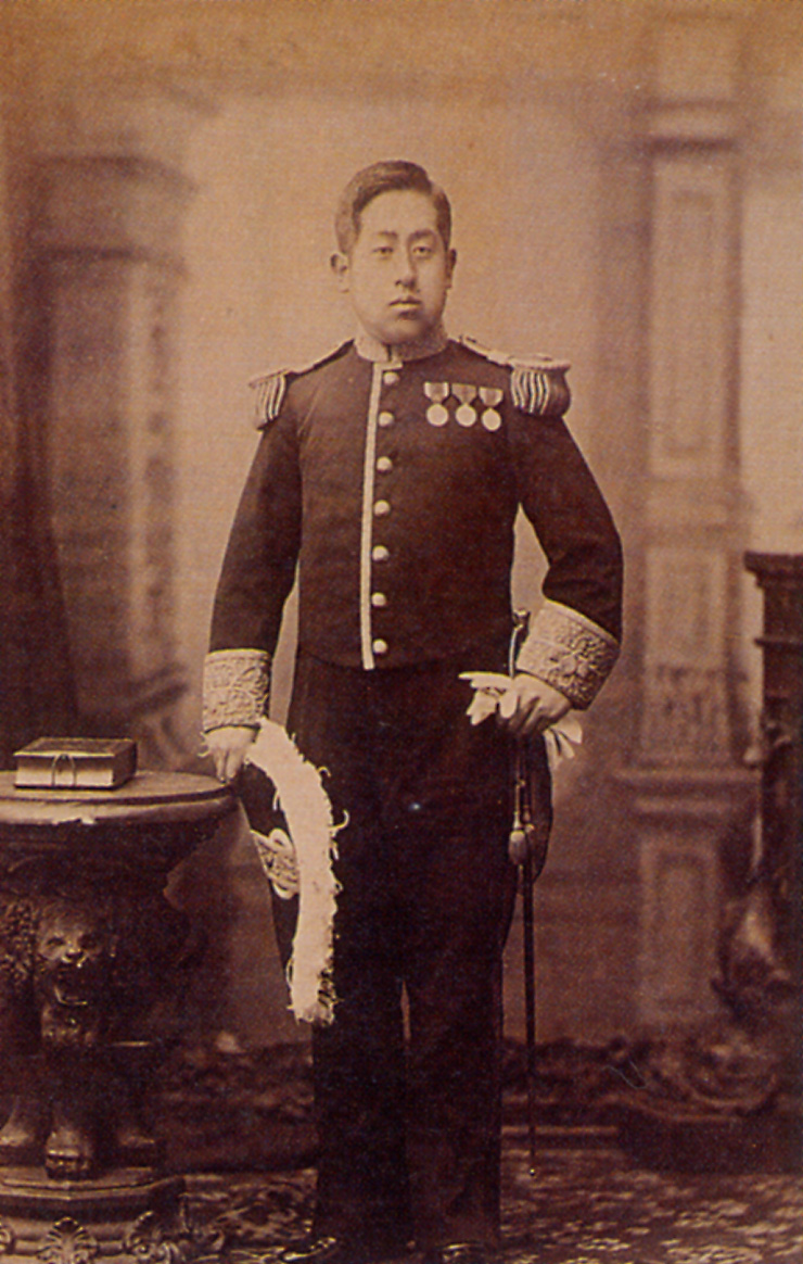 徳川家達 Tokugawa Iesato. 青年期の徳川家達